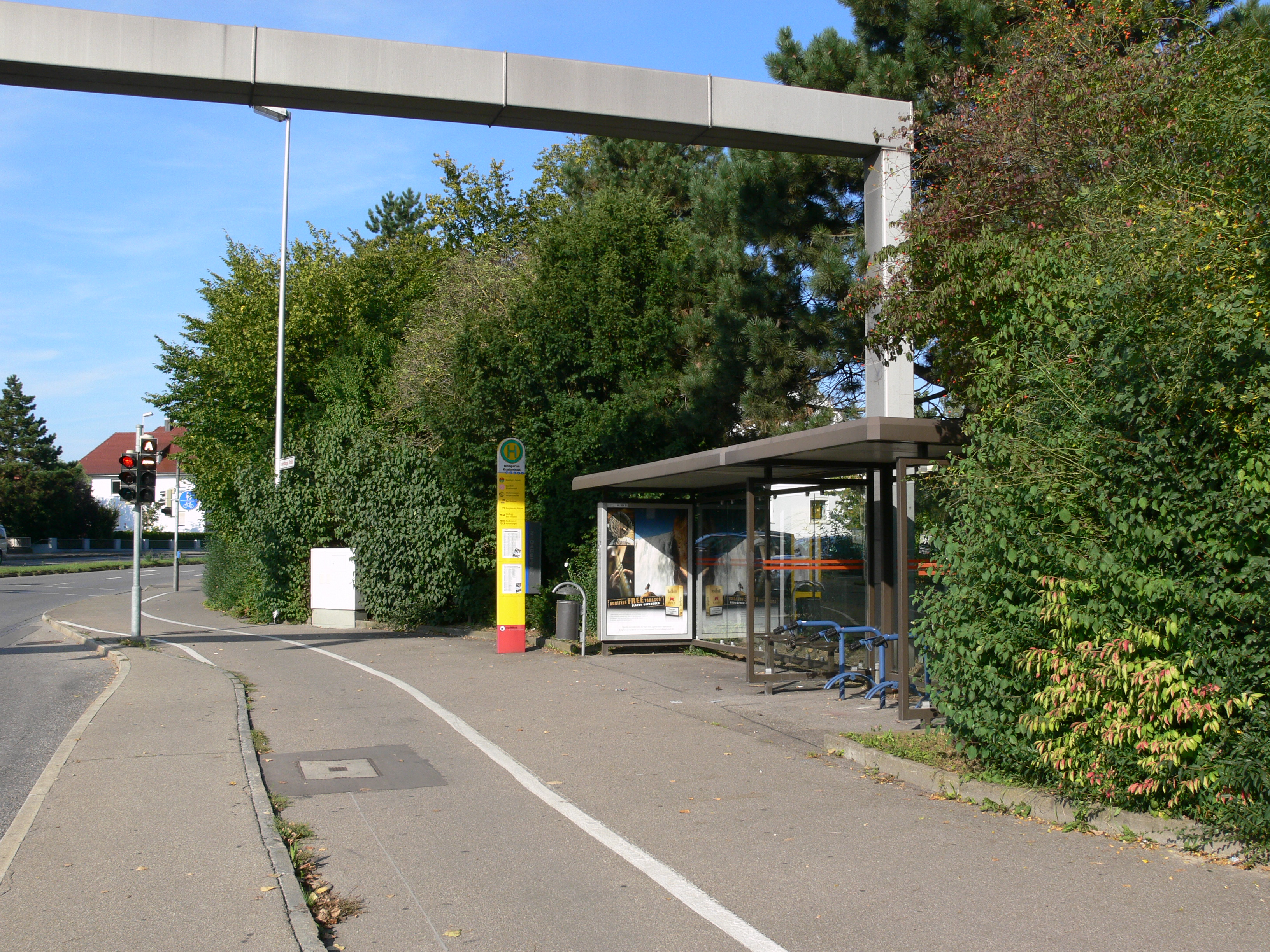 Weingarten, Bushaltestelle "Krankenhaus", Ravensburger Straße, nördliche Seite (am Krankenhaus 14 Nothelfer)